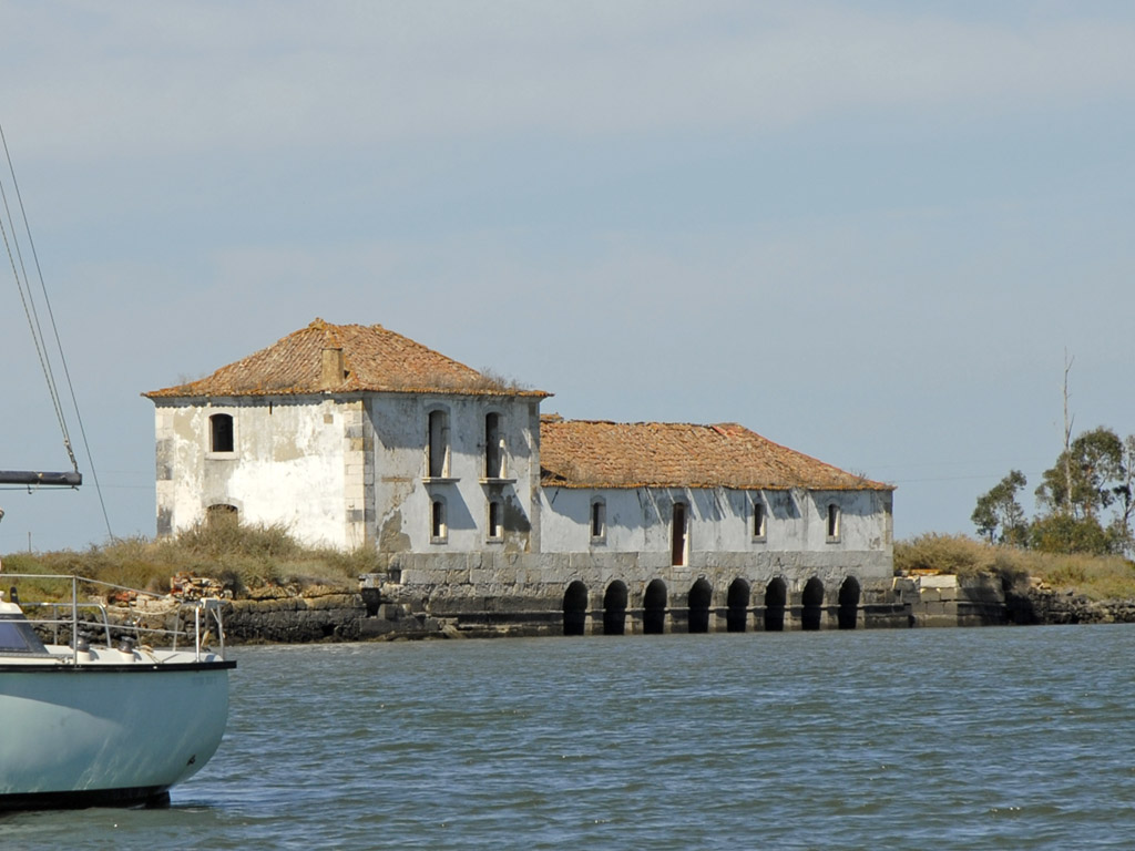 Seixal est une ville de 31.000 habitants située dans le district de Setubal, sur les bords du Tage, à 20 Km de Lisbonne. L'écomusée de Seixal étudie et valorise le patrimoine maritime et industriel de la région à travers l'aménagement de sites et d'espaces d'interprétation. Son siège se trouve dans les locaux de l'ancienne usine de liège Mundet.